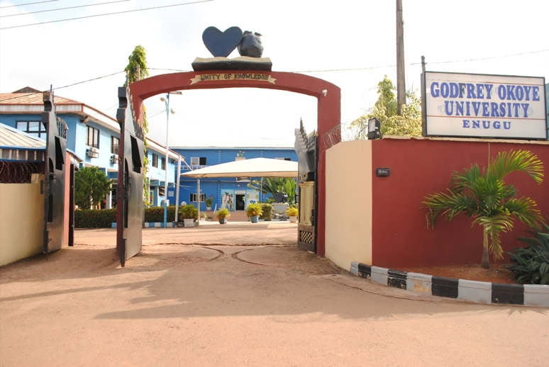 Godfrey Okoye Universität